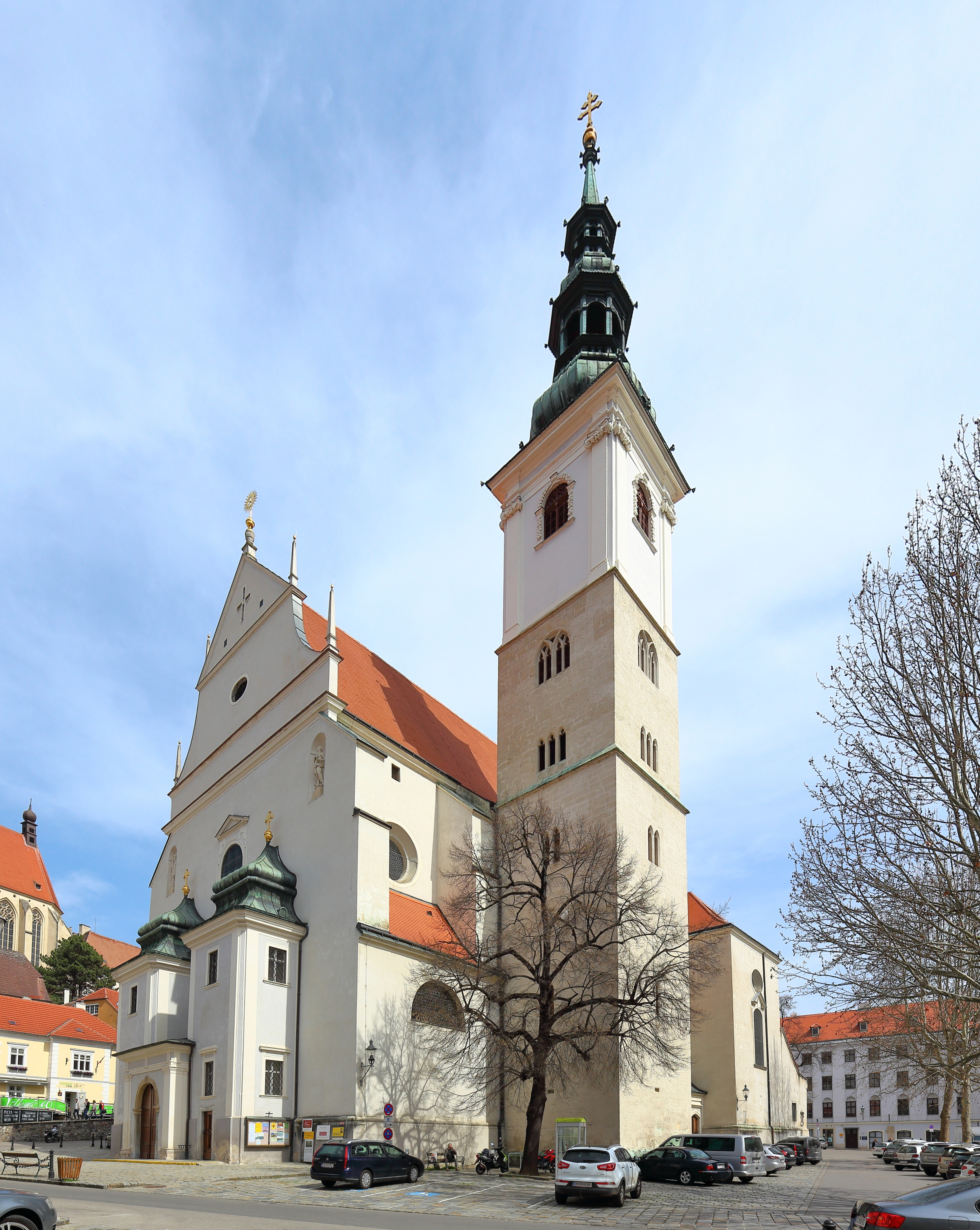 Südwestansicht der römisch-katholischen Pfarrkirche hl. Veit in der niederösterreichischen Stadt Krems an der Donau.Die Kirche wurde von 1616 bis 1630 nach Plänen der Baumeister Cypriano Biasino und Johann Baptist Spazio gebaut und war einer der ersten Barockkirchen nördlich der Alpen. Die Sakralbau besteht aus einem Langhaus mit acht Seitenkapellen, einem Querschiff und einem etwas niedrigeren Chor mit Rundapsis. Die Grabplatten an den Außenmauern erinnern an den ehemaligen alten Friedhof rund um die Kirche. In den Neubeu wurde teilweise der Turm der mittelalterlichen Vorgängerkirche miteinbezogen.